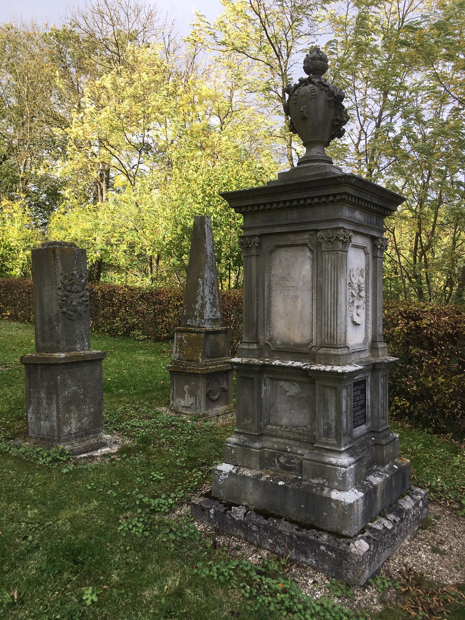 Im Friedhof der Burgkirche von Angeltürn steht das Grabmal des Freiherrn von Fick, er war der letzte seines Stammes.